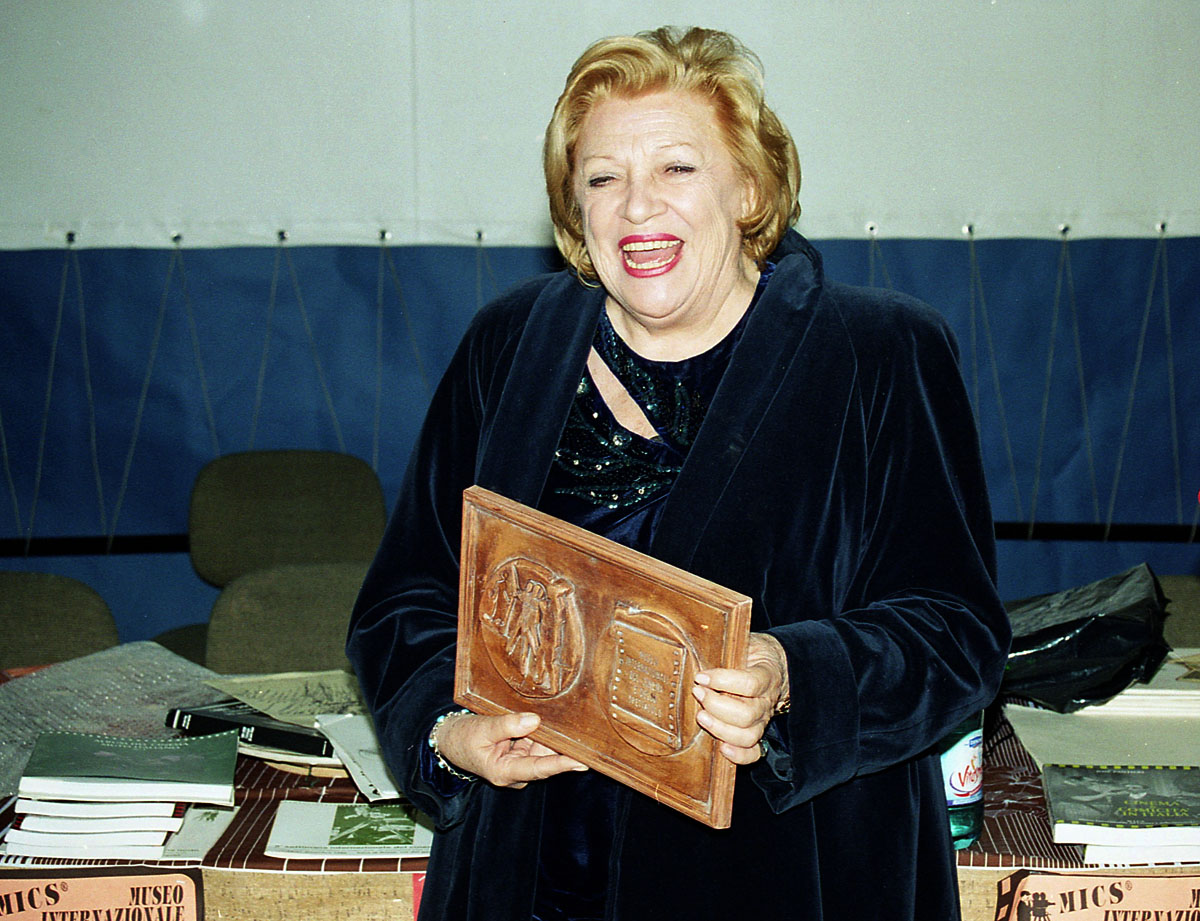 Carla Boni premio alla carriera al Museo internazionale del cinema e dello spettacolo 1999